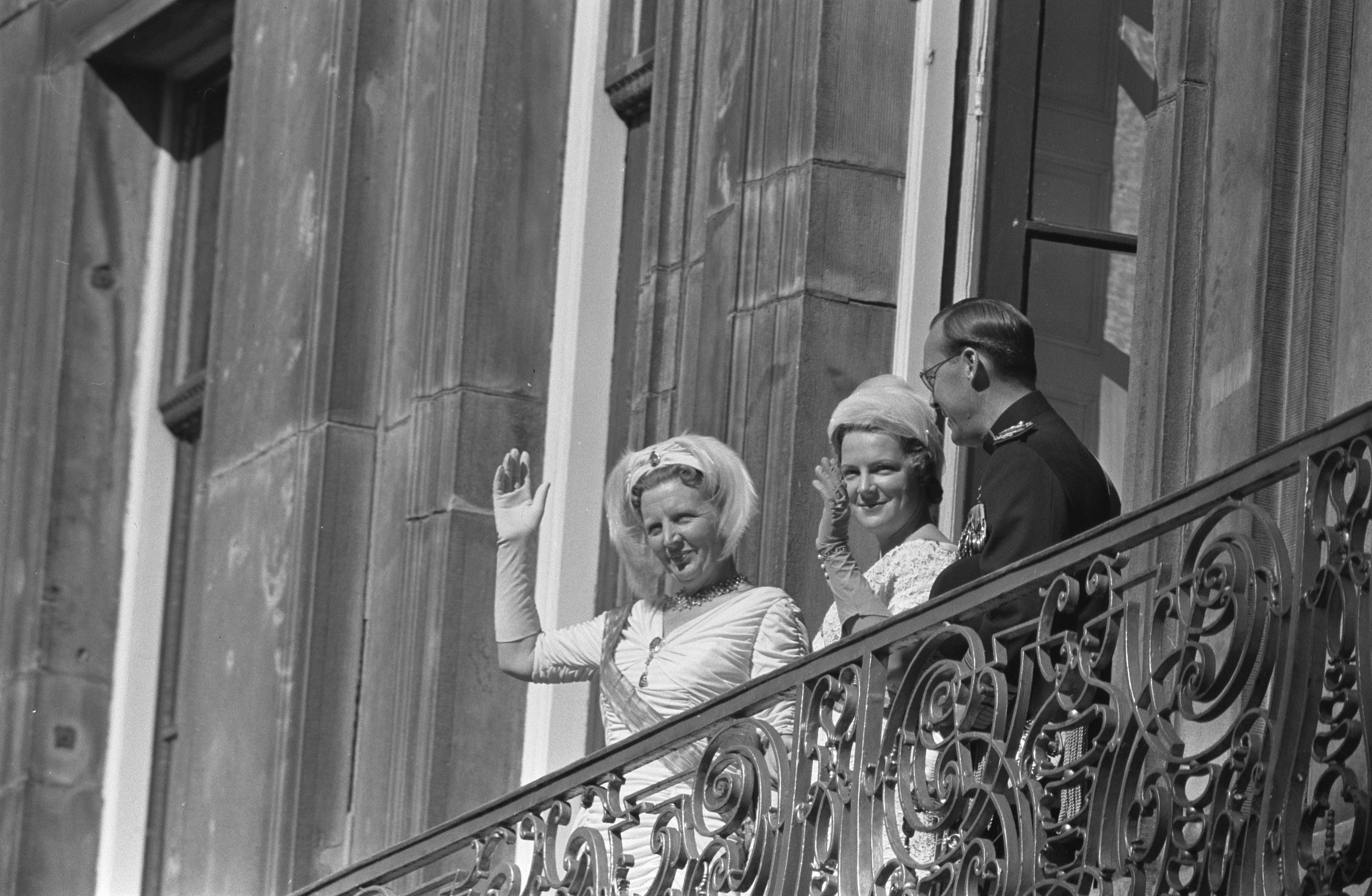 Collectie / Archief : Fotocollectie Anefo Reportage / Serie : [ onbekend ] Beschrijving : Koninklijk paar en Prinses Irene op balkon van het Lange Voorhout Datum : 15 september 1959 Trefwoorden : balkons Persoonsnaam : Irene, prinses Instellingsnaam : Lange Voorhout Fotograaf : Rossem, Wim van / Anefo Auteursrechthebbende : Nationaal Archief Materiaalsoort : Negatief (zwart/wit) Nummer archiefinventaris : bekijk toegang 2.24.01.05 Bestanddeelnummer : 910-6735